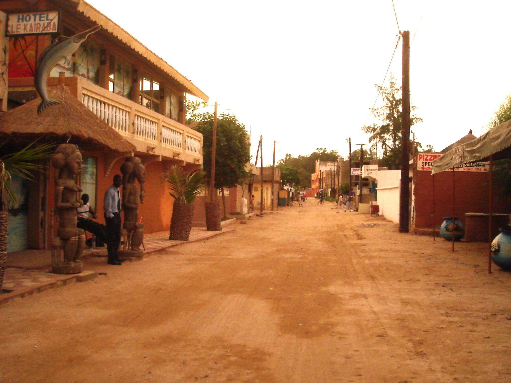 Vue sur une rue principale de Saly Niakh Niakhal et l'hôtel Kairaba.